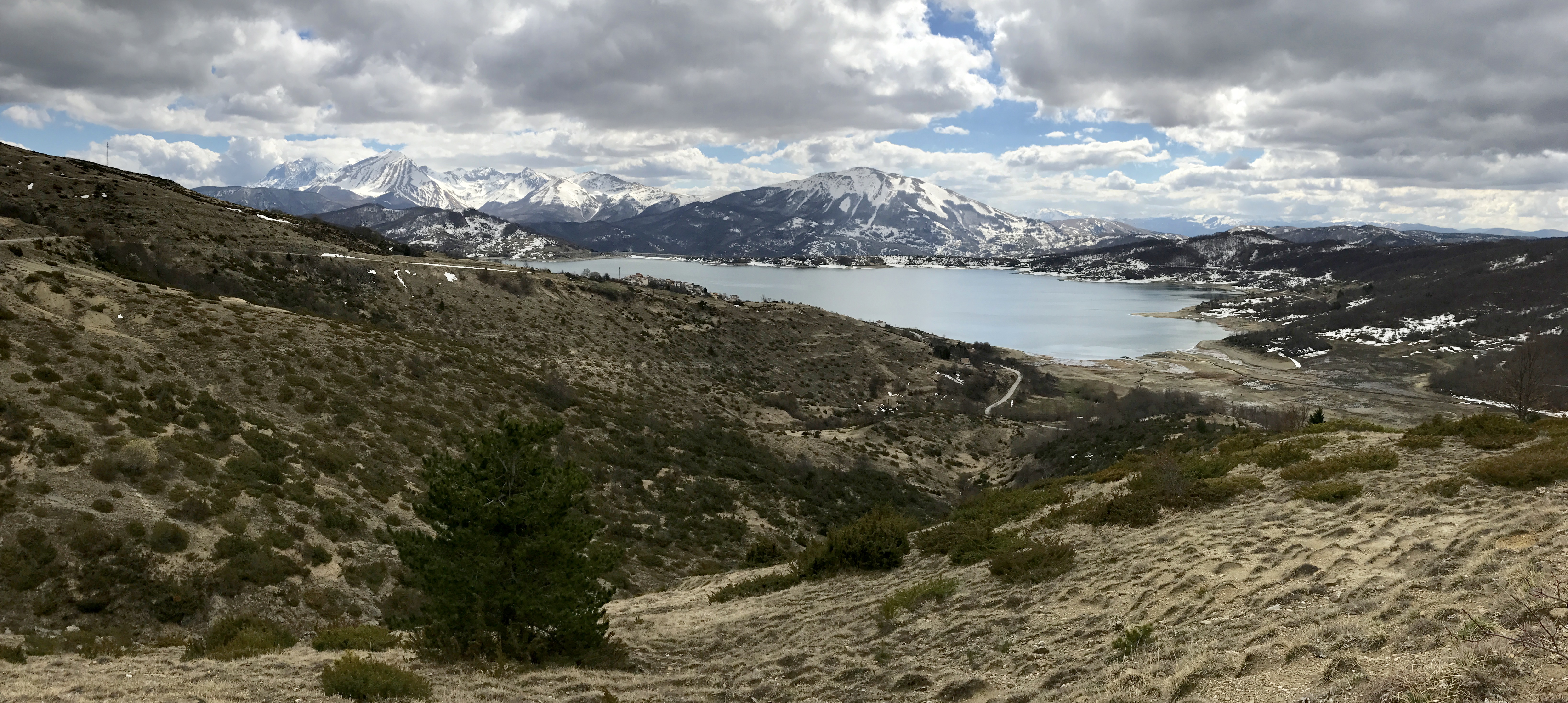 Gran Sasso National Park from Poggio Cancelli.